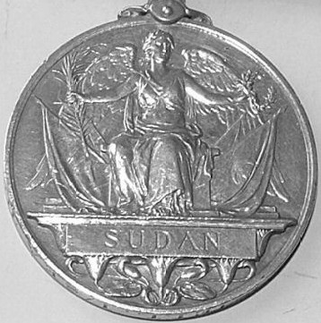 Queens Sudan Medal 1896-97 reverse